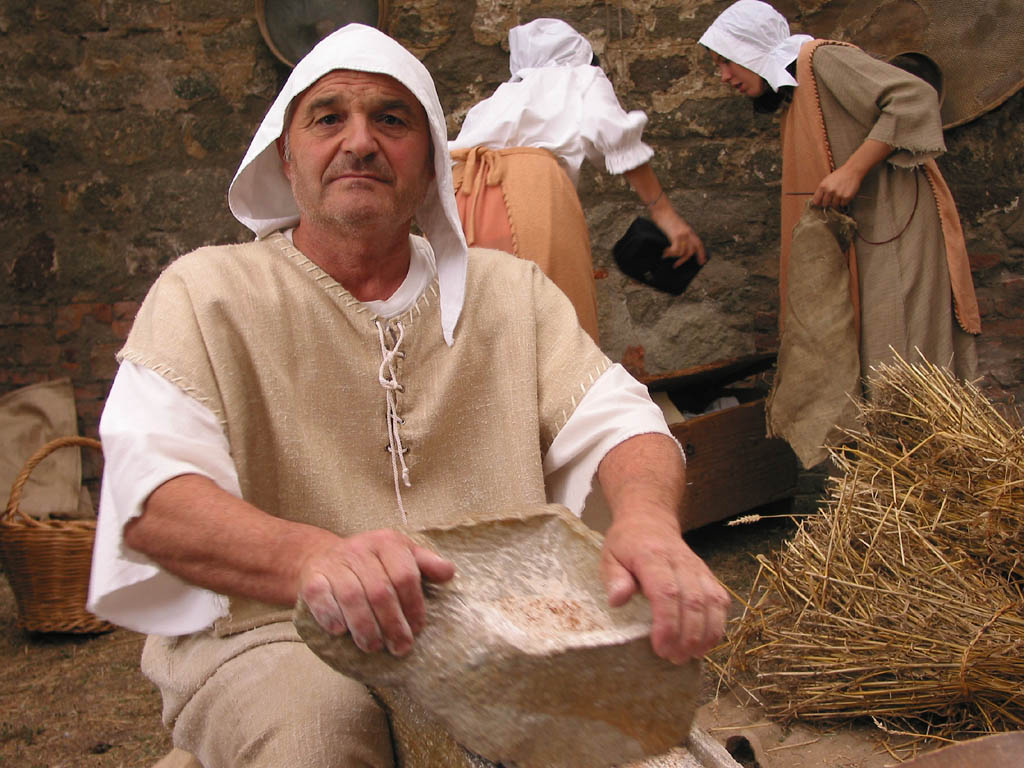 Festa Medivale di Monselice (Sept.) - Millerman